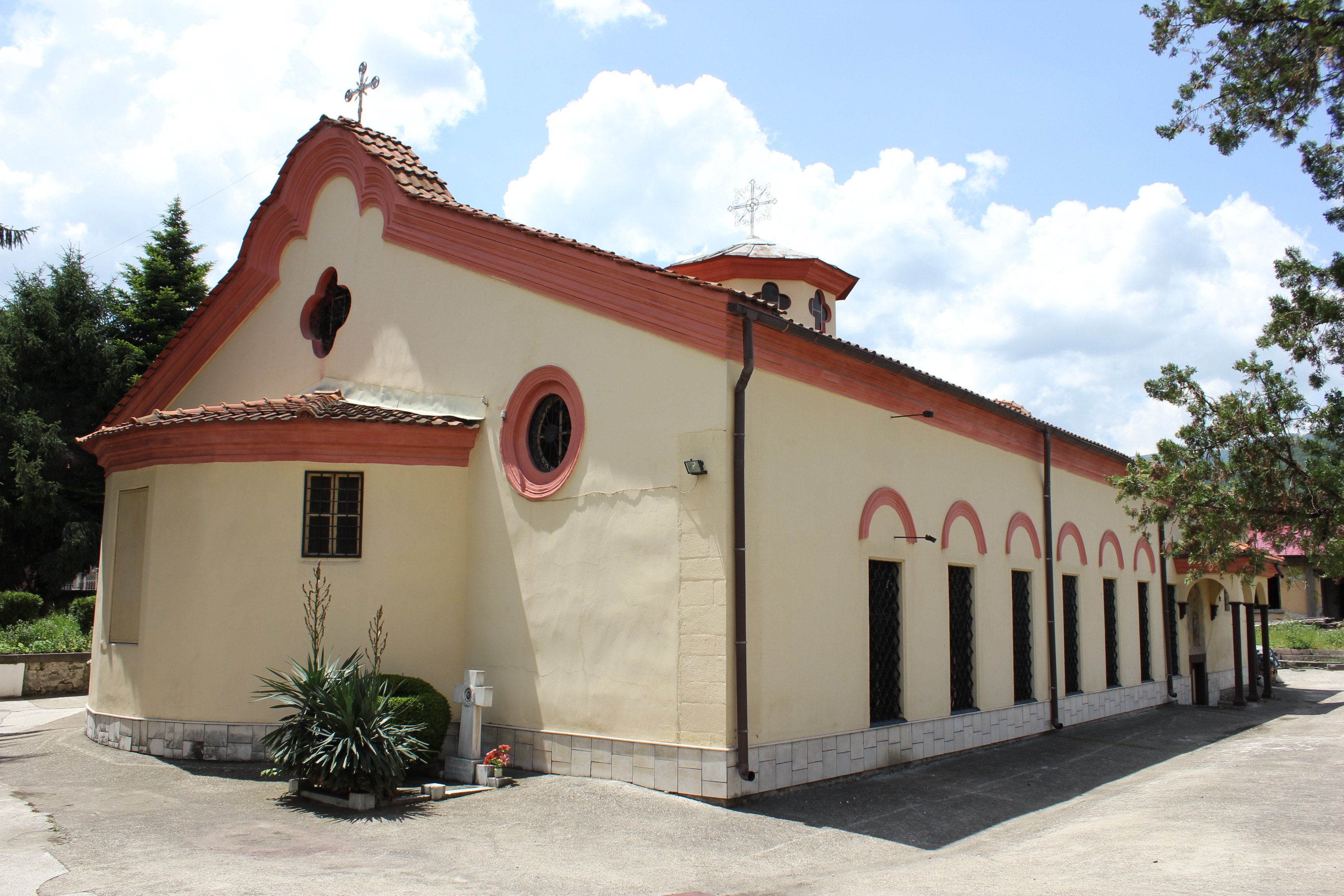 Черква „Св. Петка в град Пещера, България.